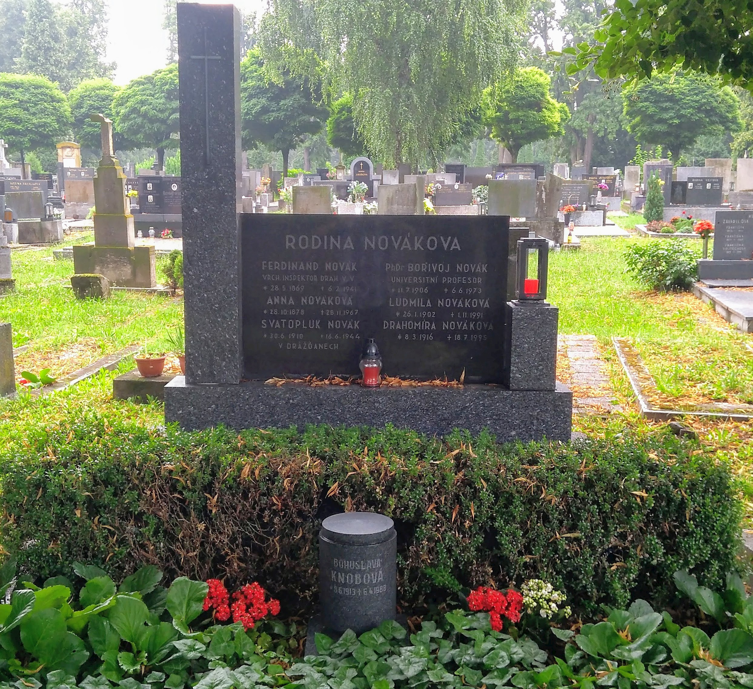 Bořivoj Novák, 11. 7.1906 v Letovicích u Boskovic, zemřel 6. 6.1973 v Brně, profesor rusistiky a literární vědy, děkan Filosofické fakulty MU, hrob na kroměřížském hřbitově